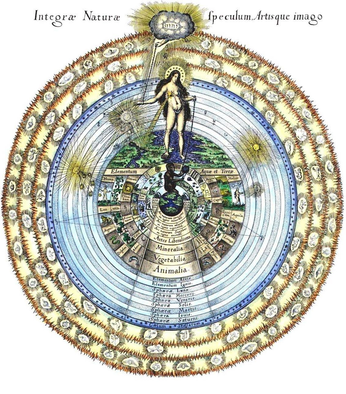 Illustrazione delle corrispondenze universali del cosmo, con al centro l'Anima Mundi, «Integra Naturae Speculum Artisque Imago» (che significa «specchio dell'intera natura e immagine dell'arte»), da Utriusque Cosmi maioris scilicet et minoris metaphysica atque technical Historia di Robert Fludd, (Oppenheim, 1617)